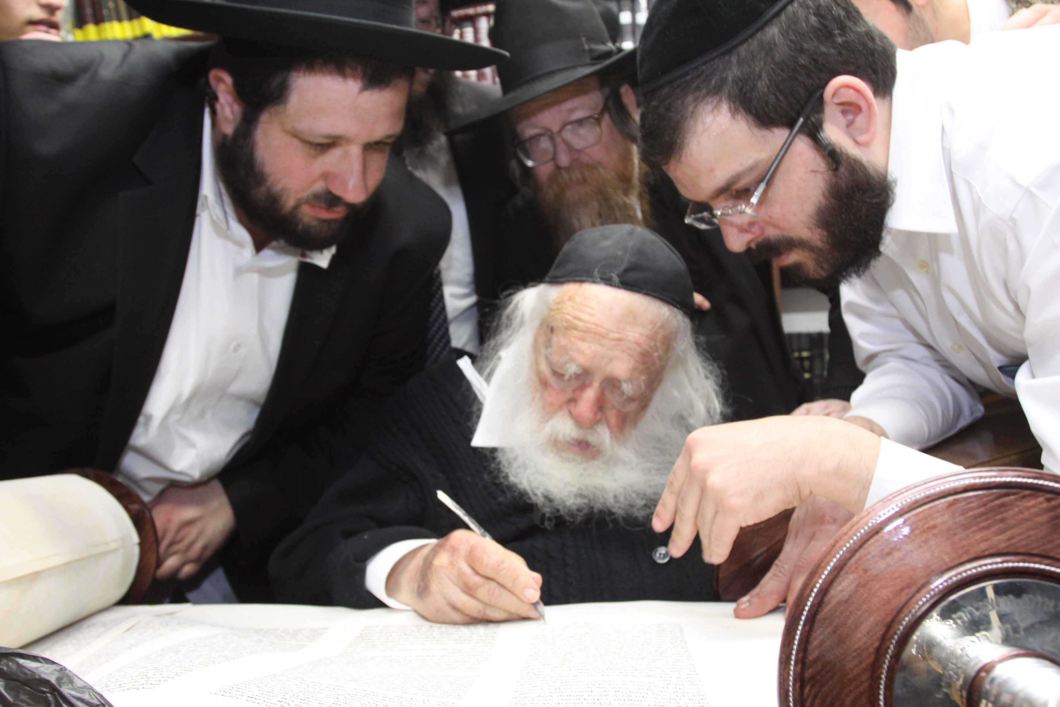 כתיבת אותיות בספר התורה של הגאון רבי חיים קנייבסקי ניסן תשע"ד